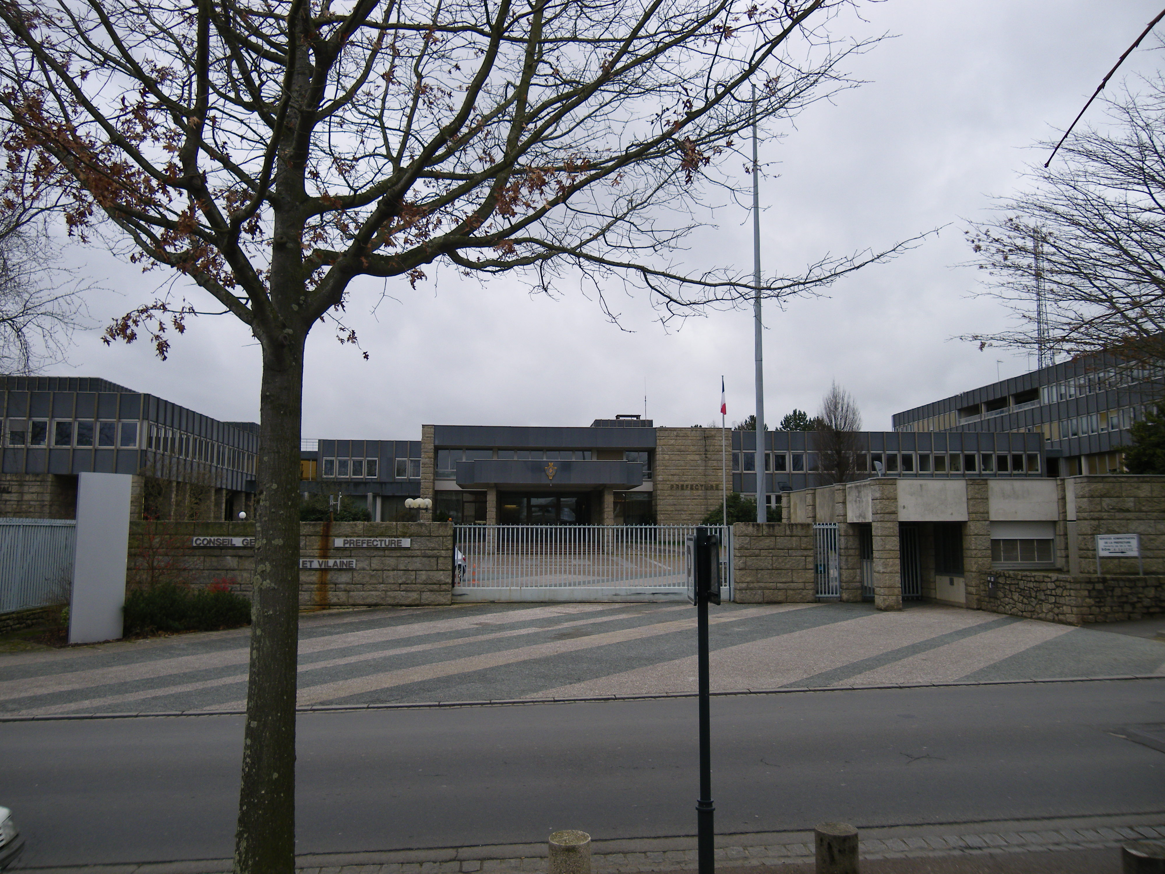 la prefecture de region